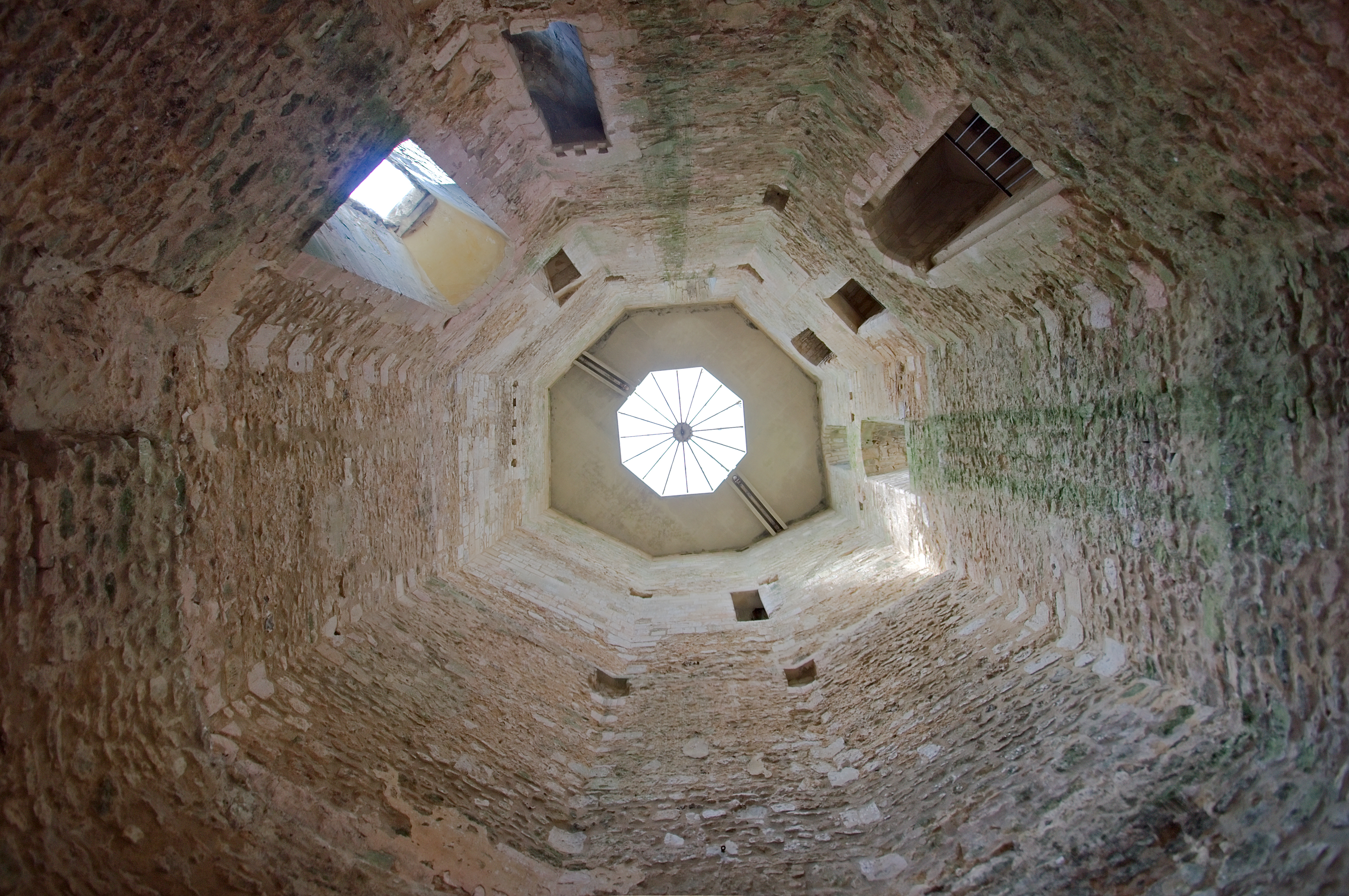 Intérieur de la tour maîtresse du château de Gisors